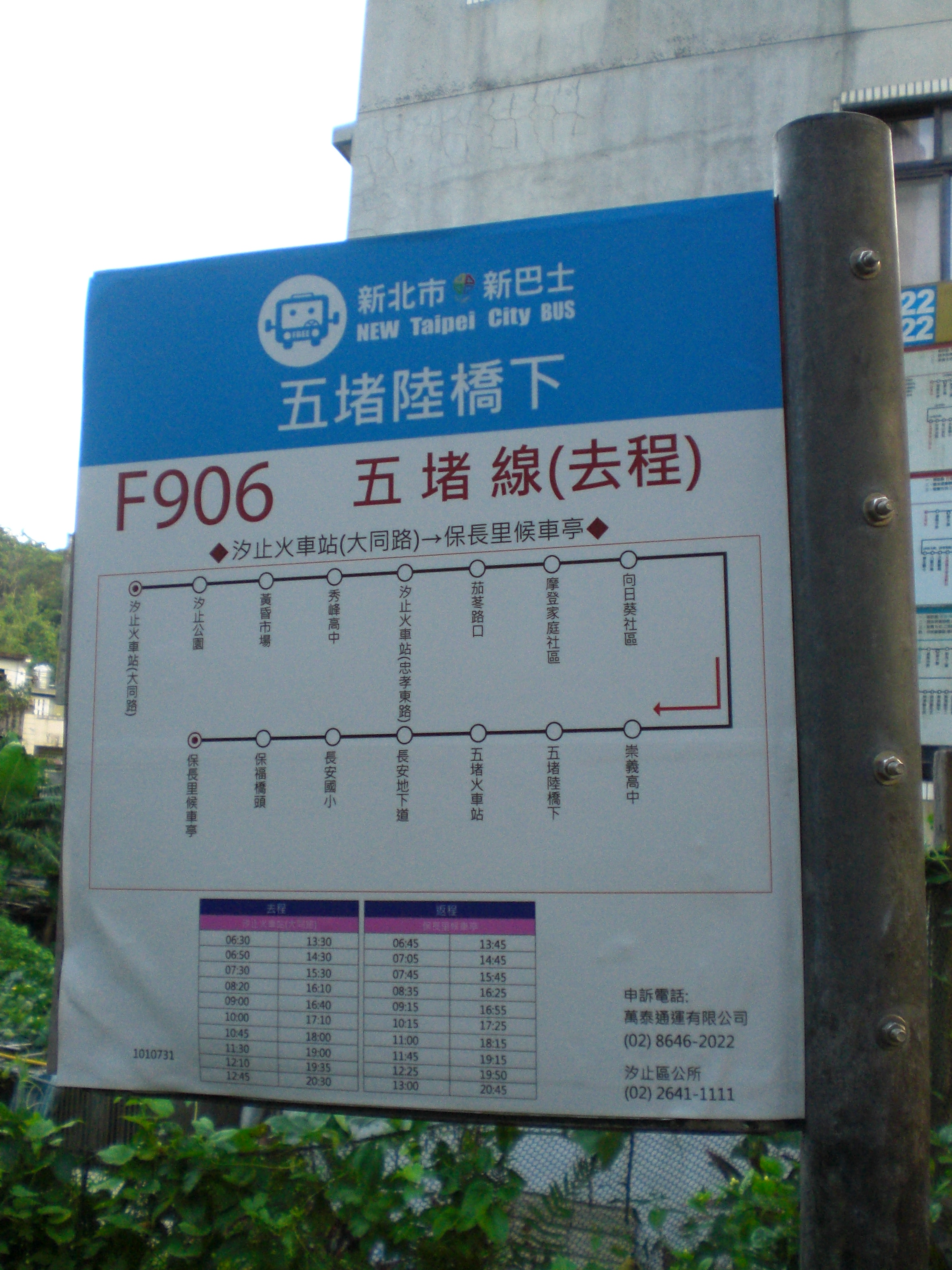 中文（台灣）: 新北市汐止區大同路三段，新北市新巴士F906線「五堵陸橋下」站牌2012年7月31日版。